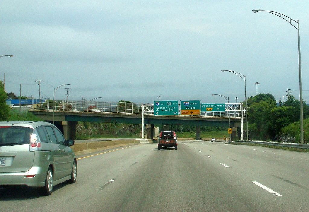 Vue de l'autoroute 40 direction est entre Québec et Sainte-Anne-de-Beaupré.